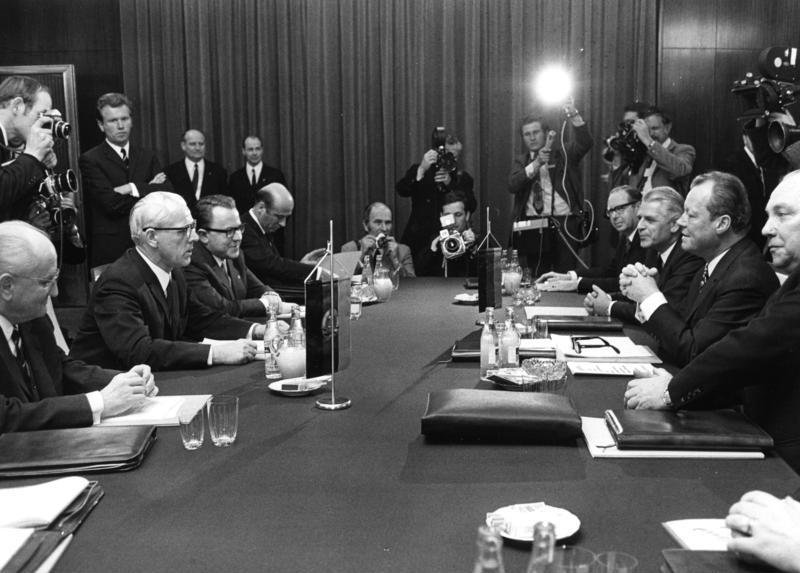 Bundeskanzler Willy Brandt in Erfurt vom 19.-20.3.1970 Gespräch im Hotel Erfurter Hof